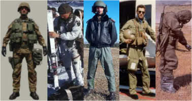 uniformi da combattimento dell'esercito italiano